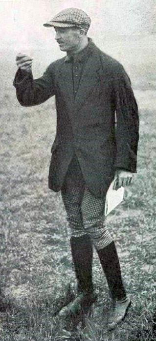 Jules Goux à Indianapolis en 1913, p.479